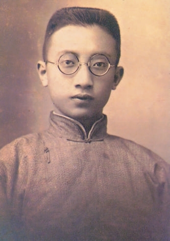 青少年時期的費彝民